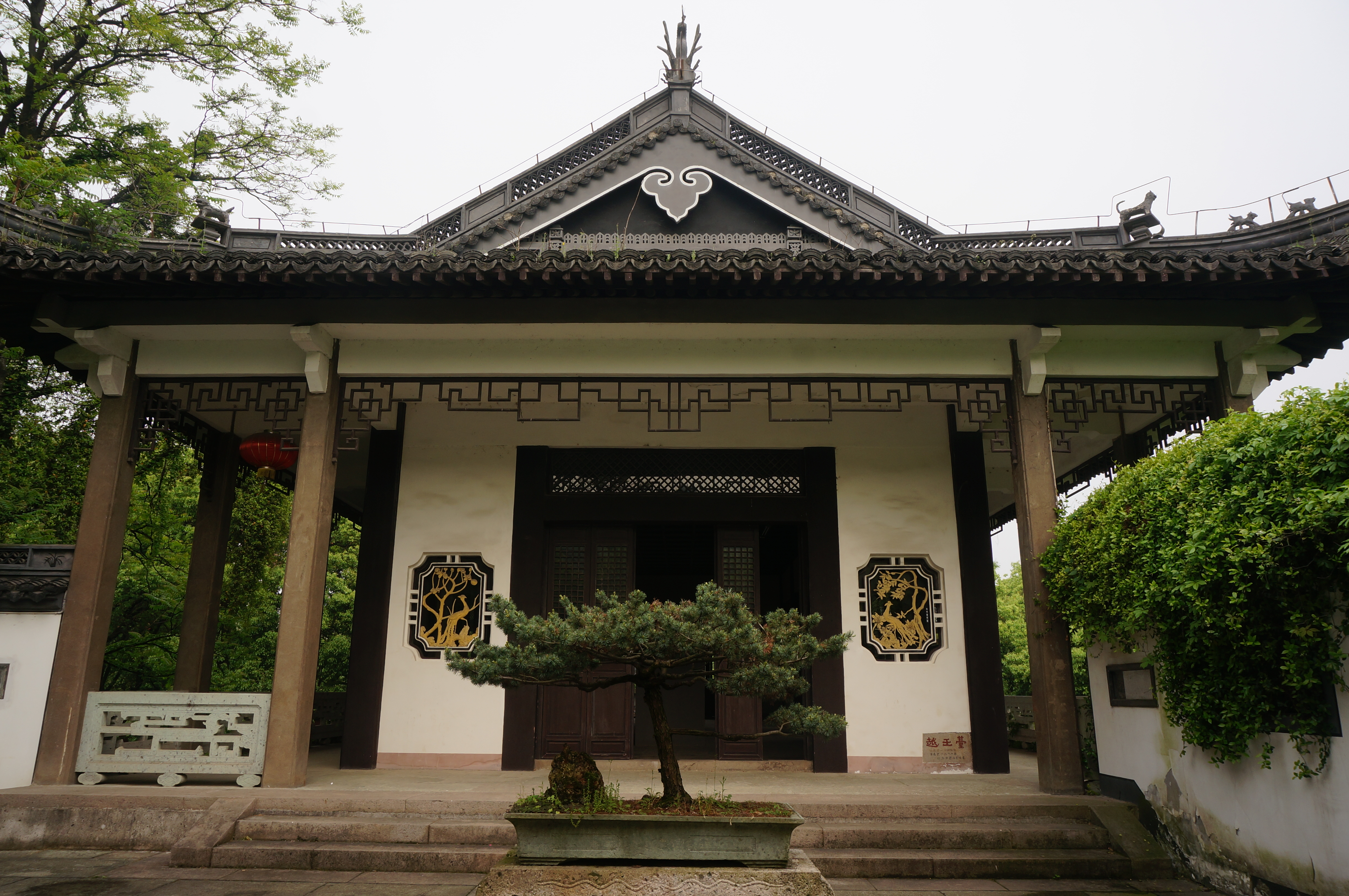 绍兴府衙遗址，谯楼（今越王台）二层西面，近年新建的越王台。